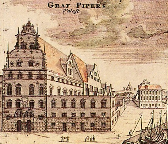 Petersenska huset i Gamla stan, Stockholm, kolorerat kopparstick. Till höger om det syns nuvarande Piperska palatset